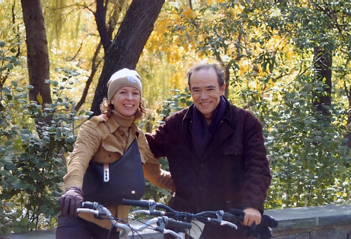 Los Marqueses de Marañon en el Cigarral de Menores de Toledo